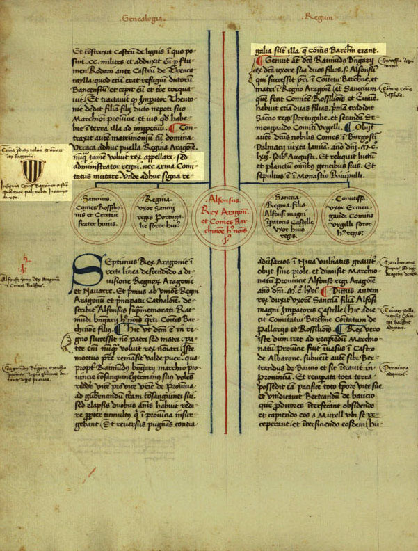 Genealogies dels comtes de Barcelona; continuades per l'arxiver Jaume Garcia i per Pere Miquel Carbonell. Manuscrit 246